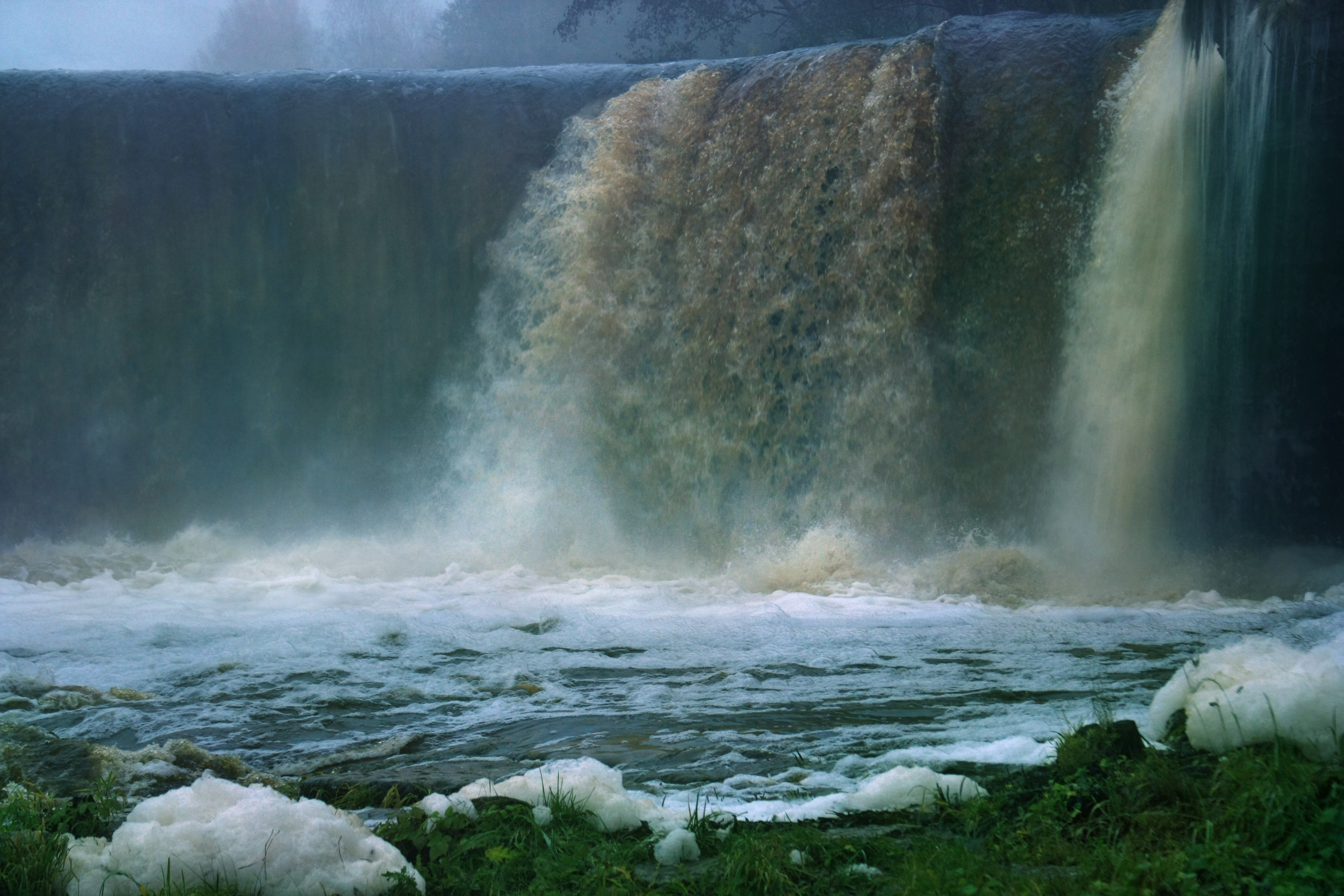 Vahutav Jägala kosk